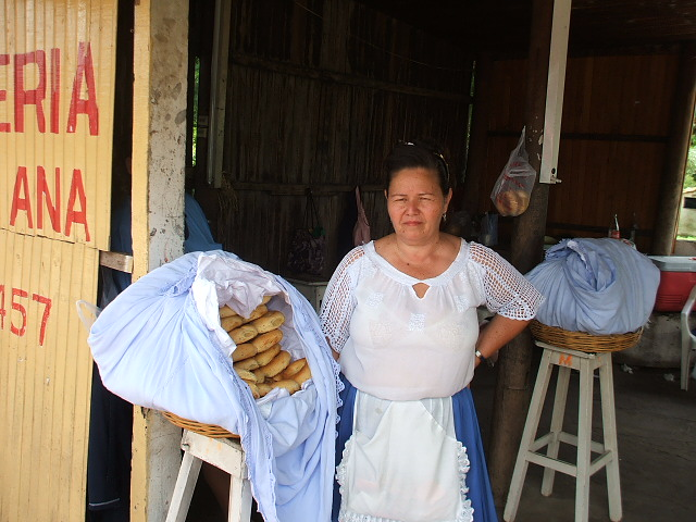 Chipa pirú Paraguay